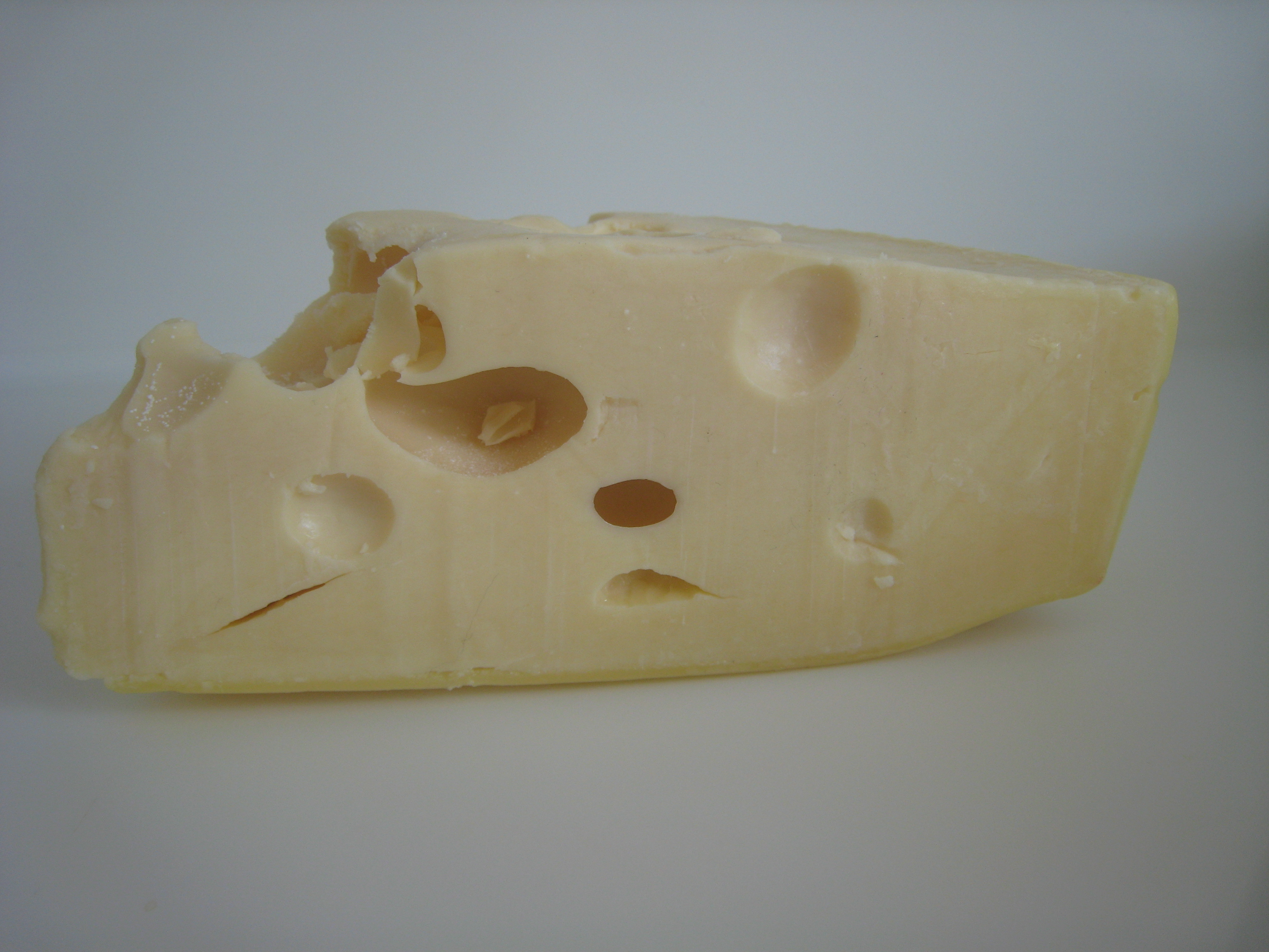 Grevé